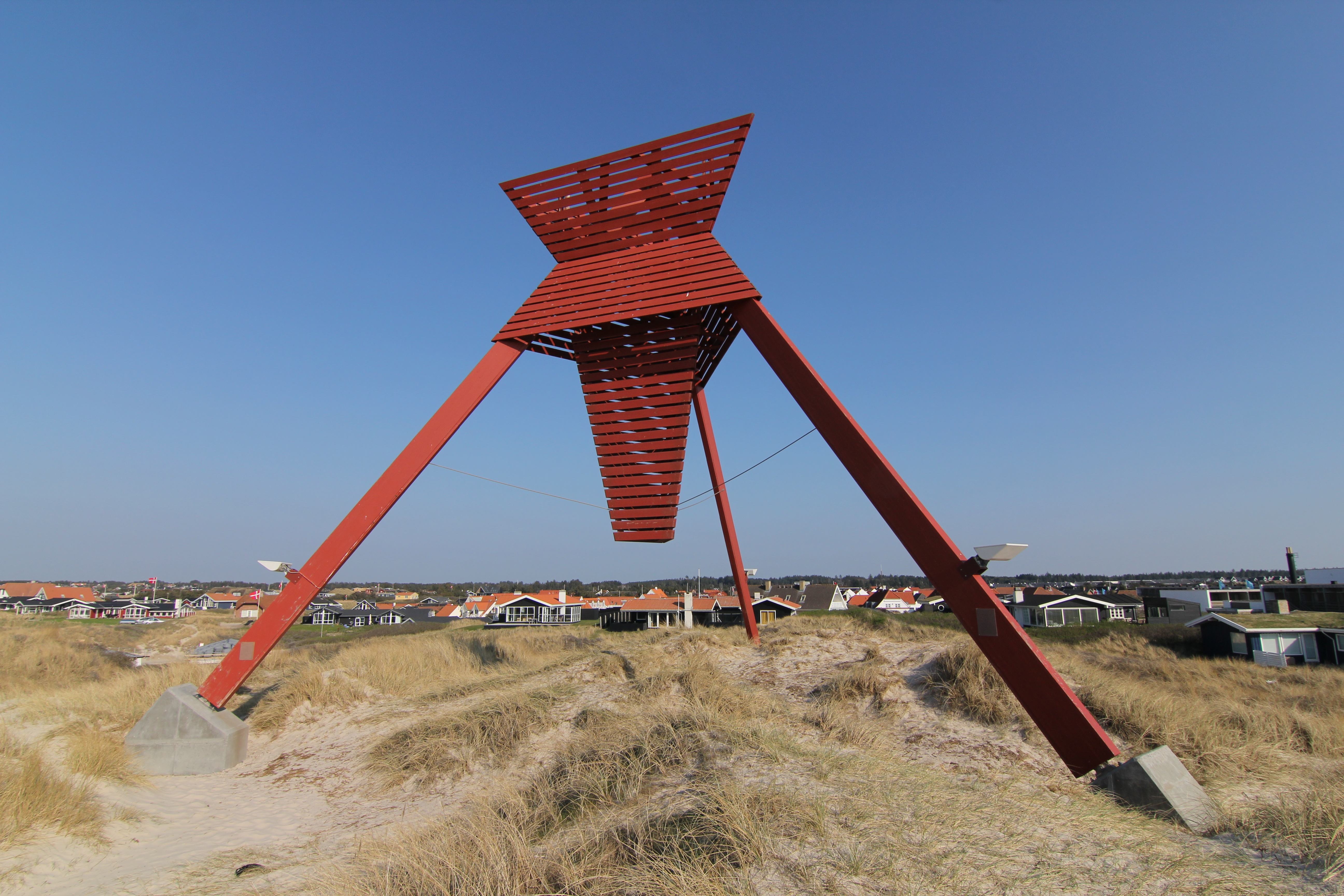 Genopbygget sømærke ved Blokhus i Nordjylland